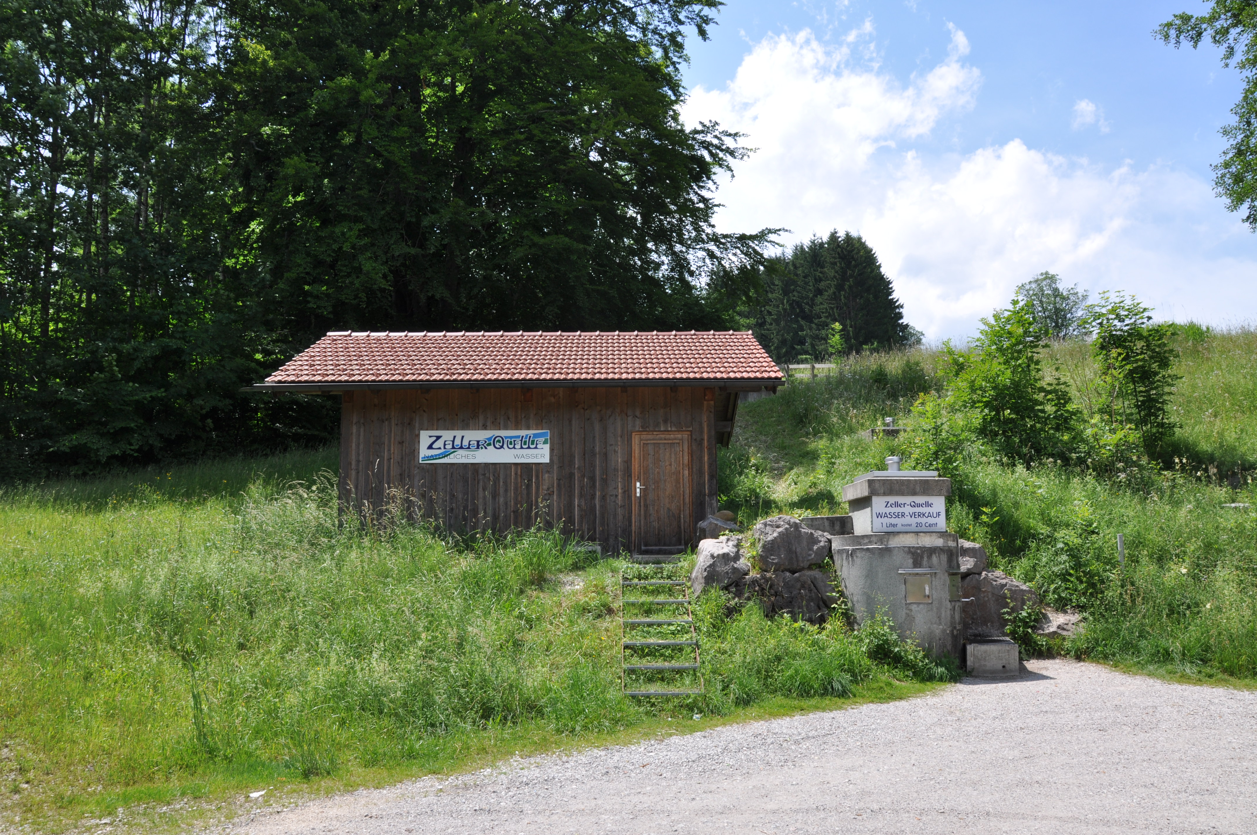 Quelle St. Georg in Ruhpolding (Maiergschwendt). "Zeller Quelle" ist der Name der Quelle und Georgsquelle der Verkaufsname [1]